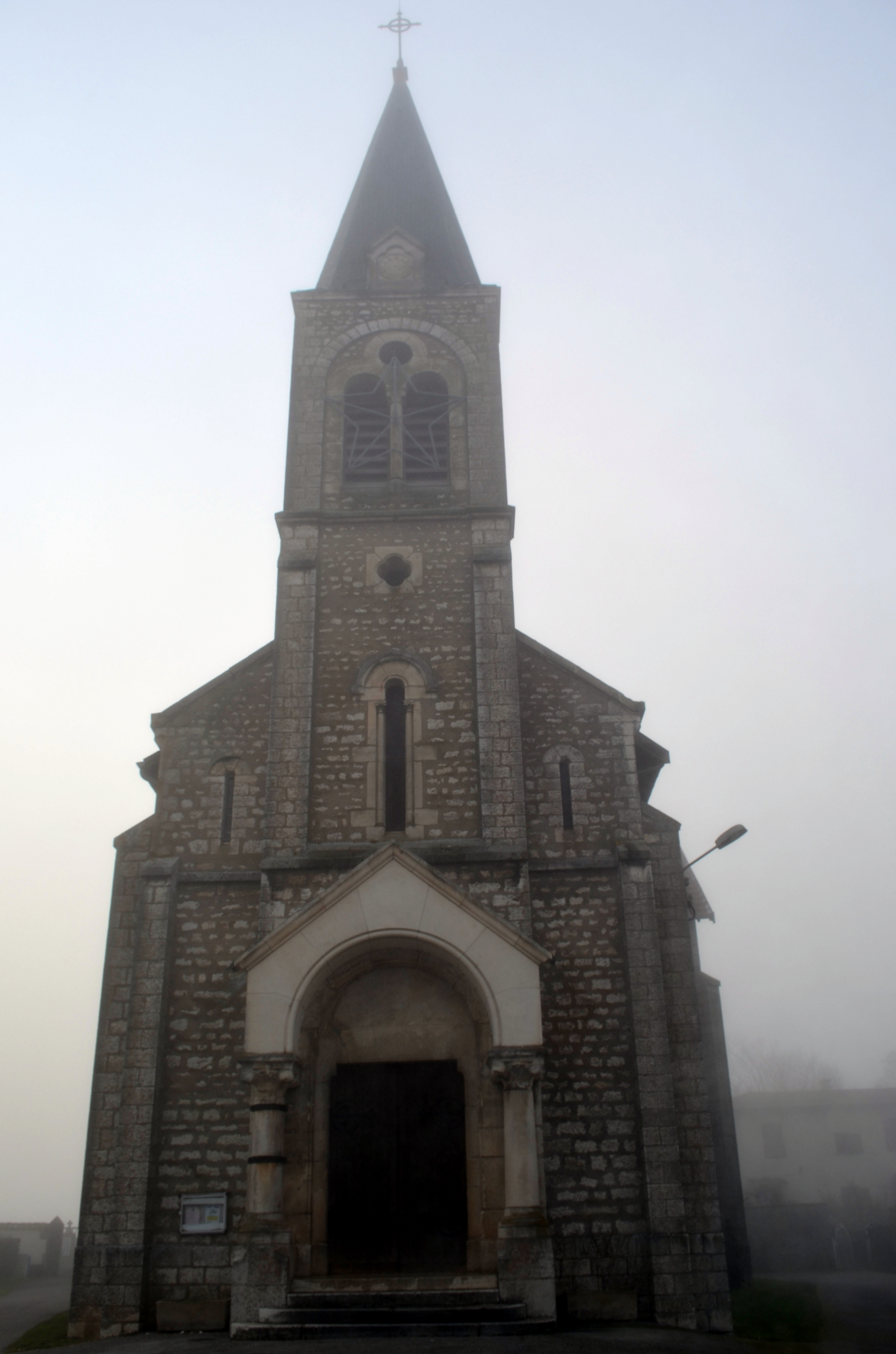 Église Saint-Pierre de Birieux.